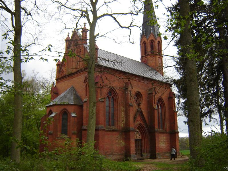 Kościół filialny p.w. Matki Boskiej Szkaplerznej w Wicewie - Parafia Byszyno.